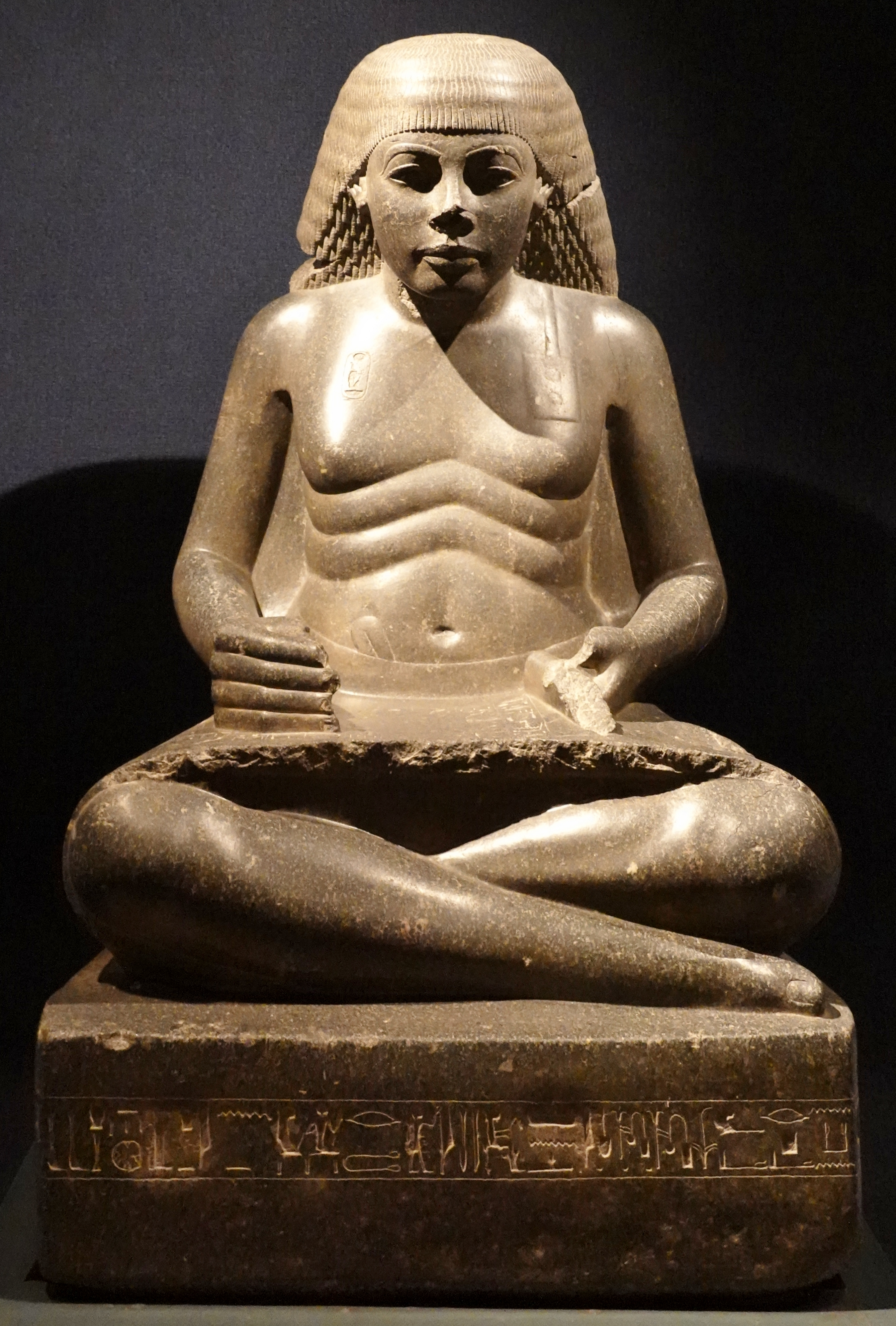 Sitzstatue des Amenophis, Sohn des Hapu, aus der Herrschaftszeit Amenophis III. (Höhe 130,5 cm, grauer Granit, 18. Dynastie), gefunden 1913 vor dem 10. Pylon des Karnak-Tempels, ausgestellt im Luxor Museum, Ägypten